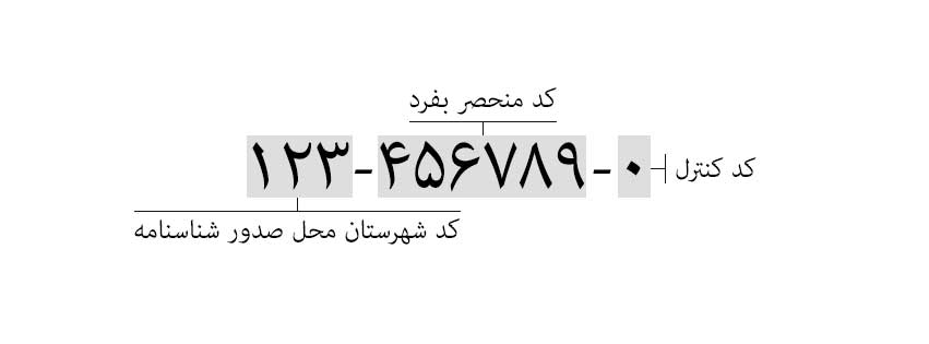 بخس اول (سه رقم) از سمت چپ کد شهرستان محل صدور شناسنامه بخش دوم (شش رقم): کد منحصر بفرد، بخش سوم (یک رقم): رقم کنترل